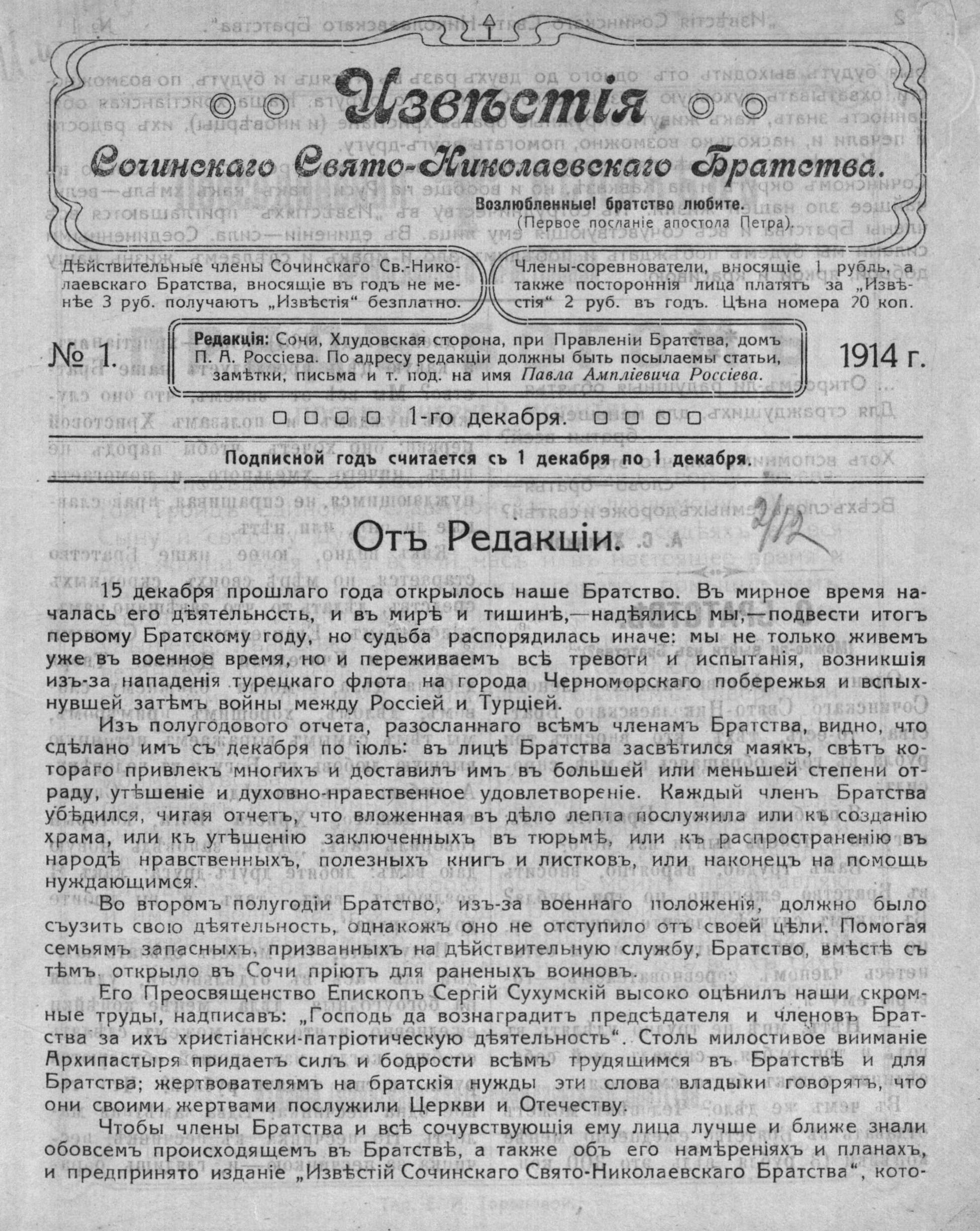 Журнал известия Свято - Николаевского Братства. Редактор Павел Амплиевич россиев